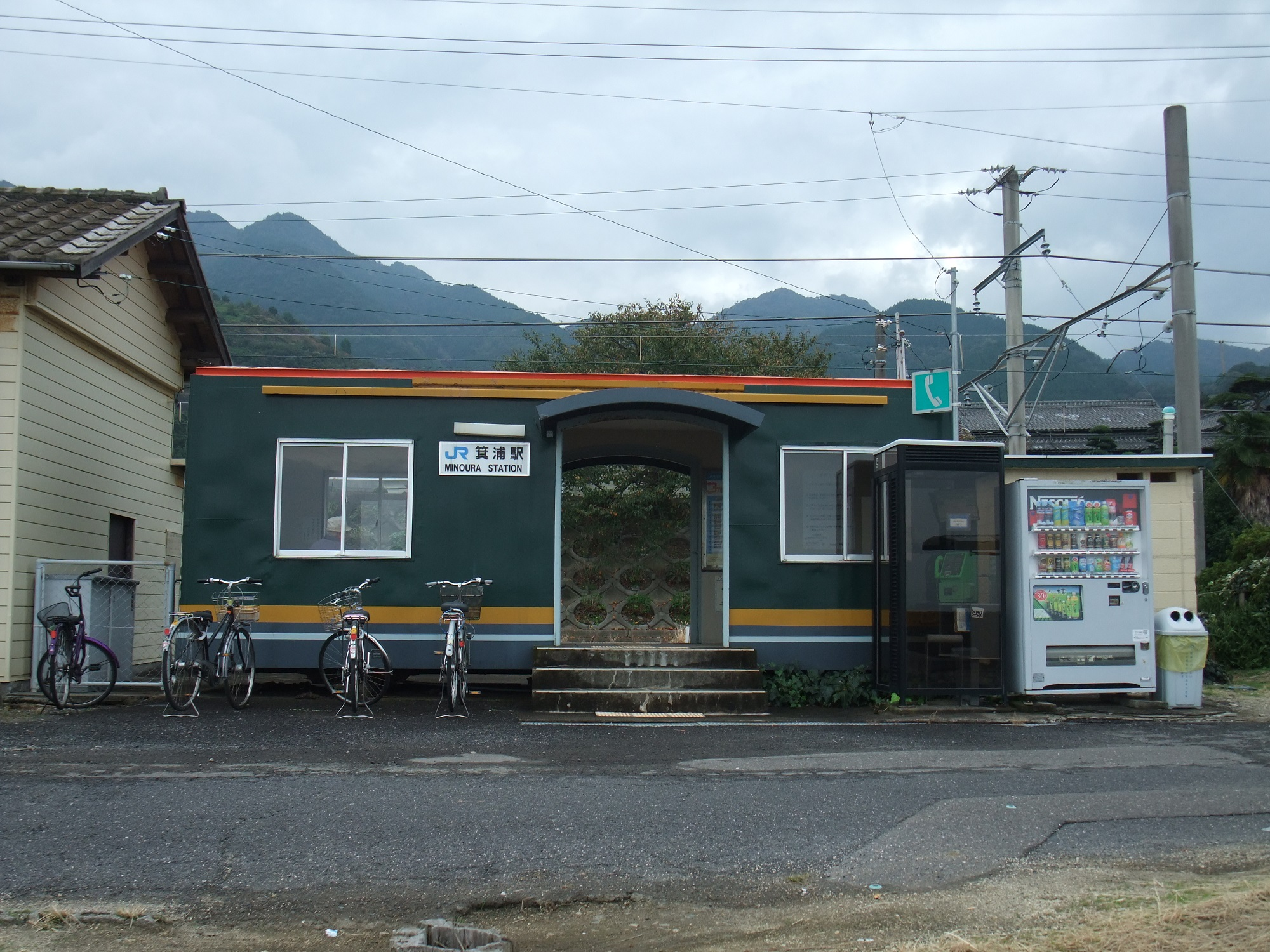 予讃線箕浦駅